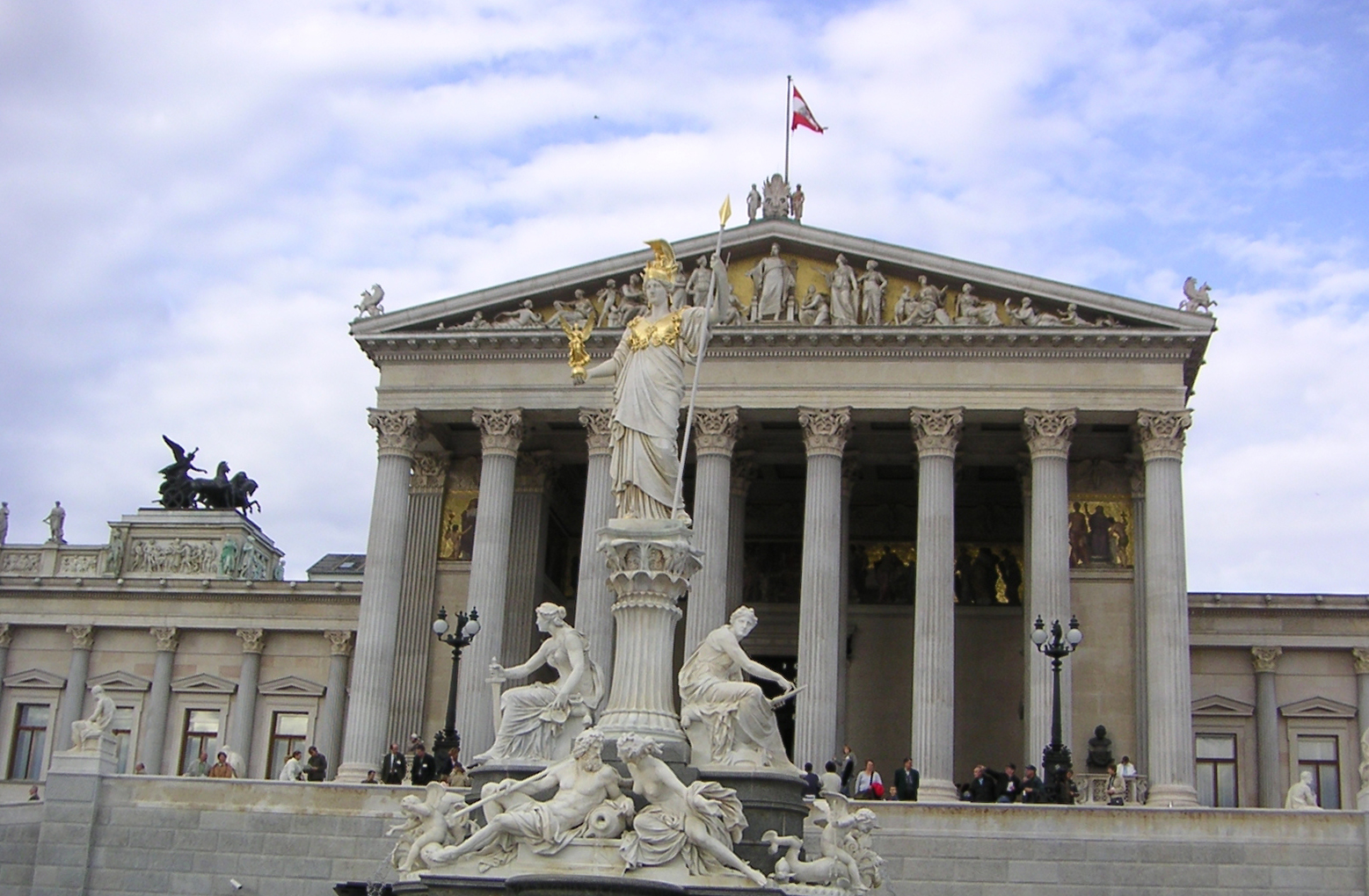 Parlament in Wien, fotografiert durch Peter Binter, Oktober 2005